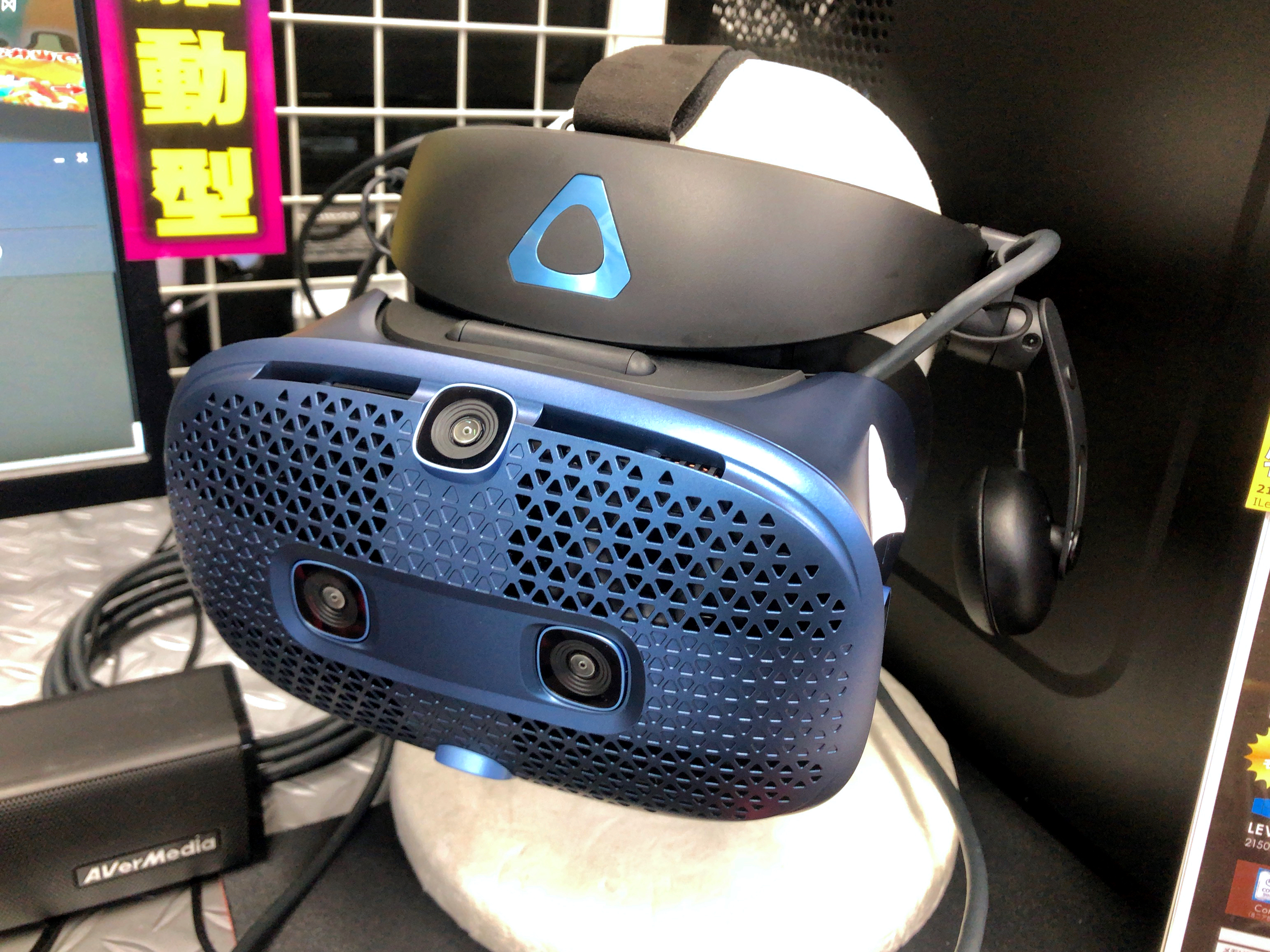 名古屋市内のお店で店頭展示されてたHTCのHMD「Vive Cosmos」。